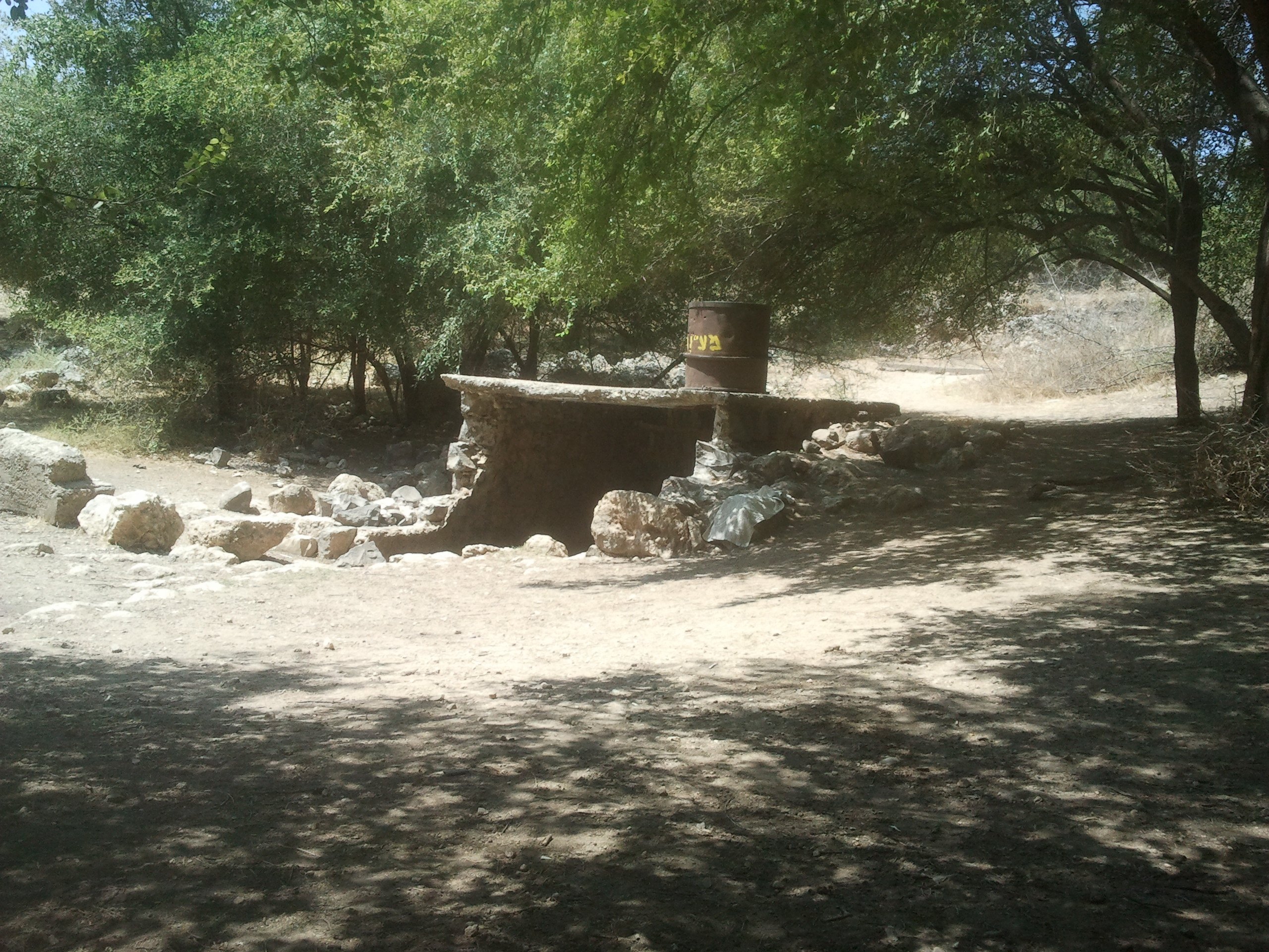 עין חקוק, מעיין ששימש את הכפר היהודי מימי המשנה והתלמוד חוקוק, ואת הכפר הערבי יאקוק ששכן על שרידי היישוב העתיק נמצא בגליל בקרבת כביש 65 בית המעיין בתוך חורשת עצי השיזף